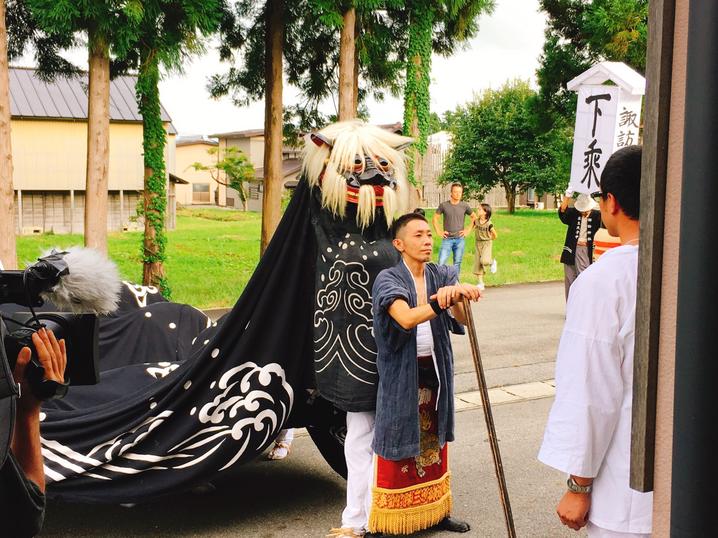 萩生諏訪神社荒獅子